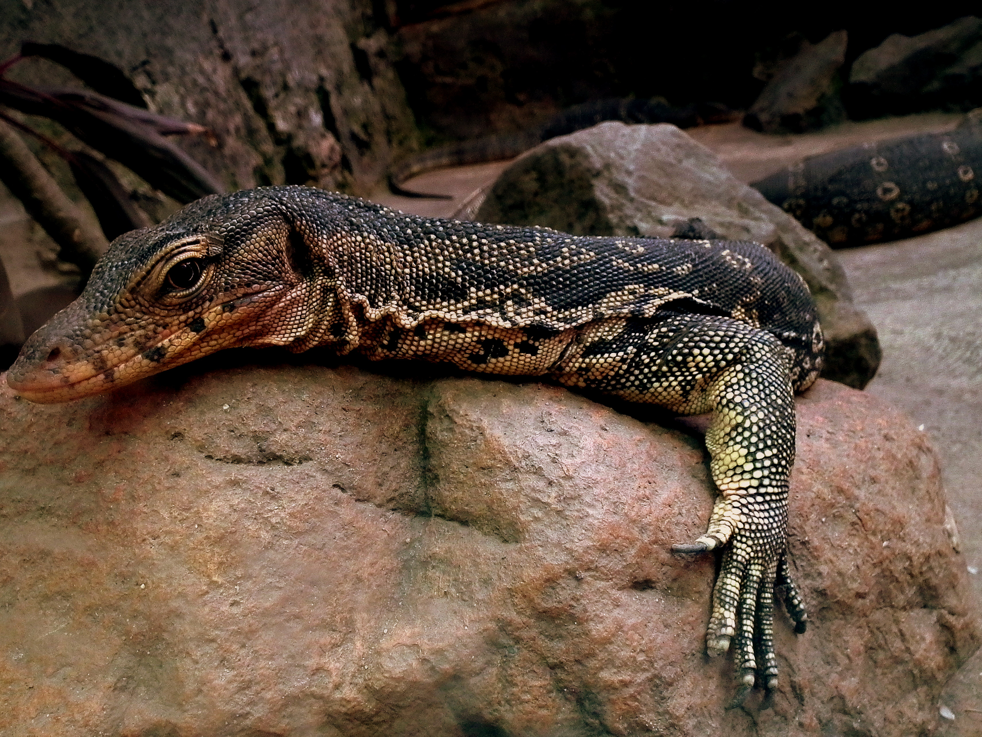 SAIGON ZOO VIETNAM JAN 2012